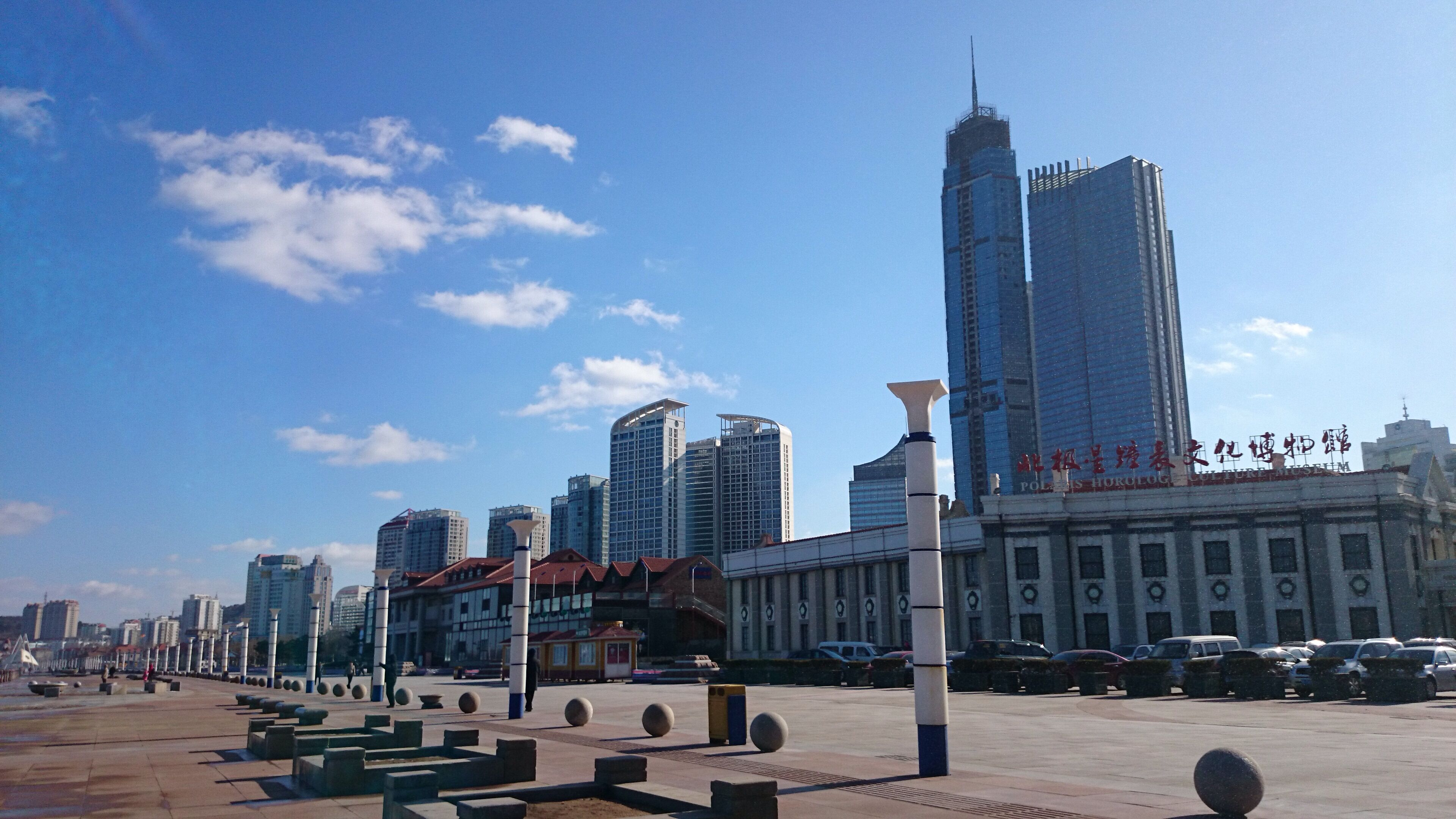 於2015年1月攝於中國煙台